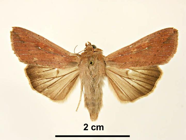 Mythimna unipuncta female, dorsal view